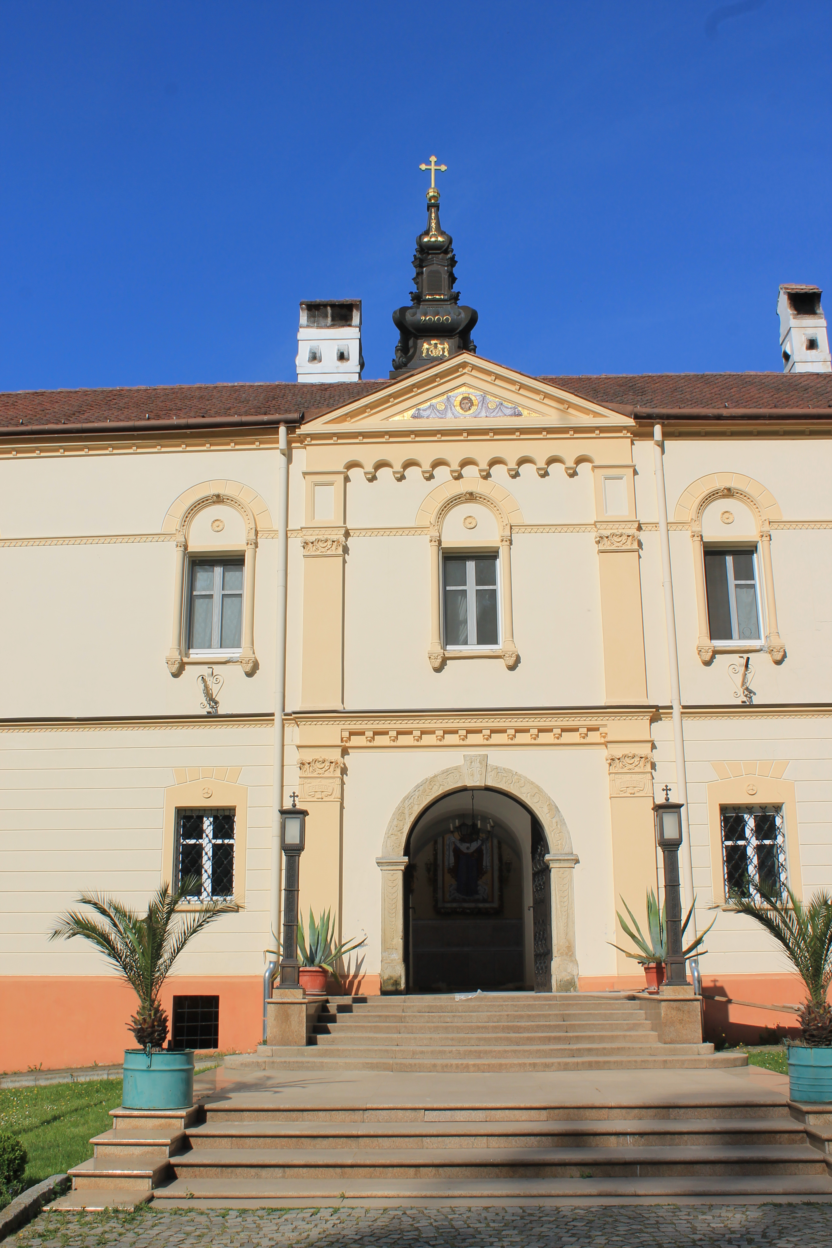 Manastir Grgeteg, april 2018.